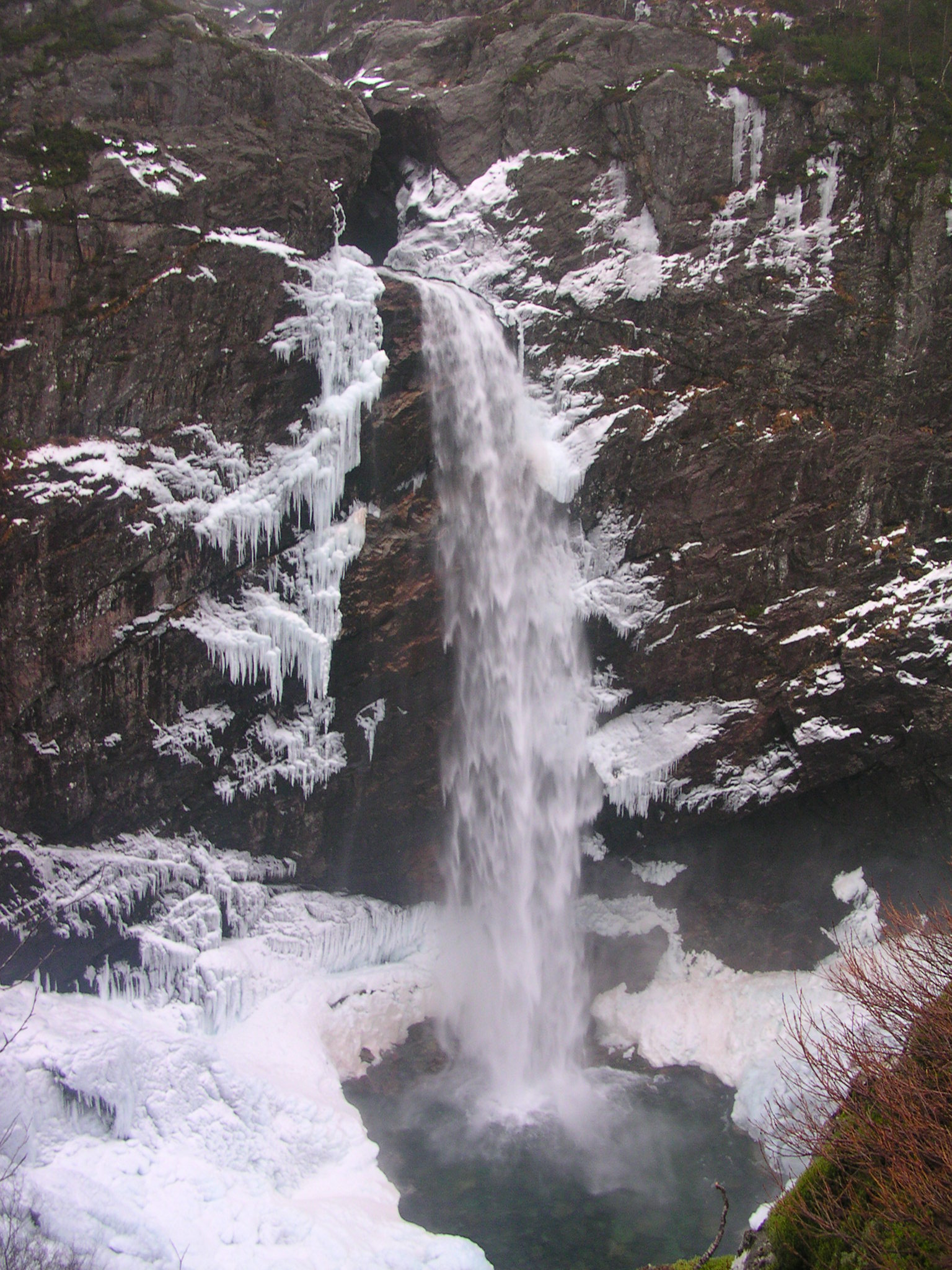 Månafossen february 2007